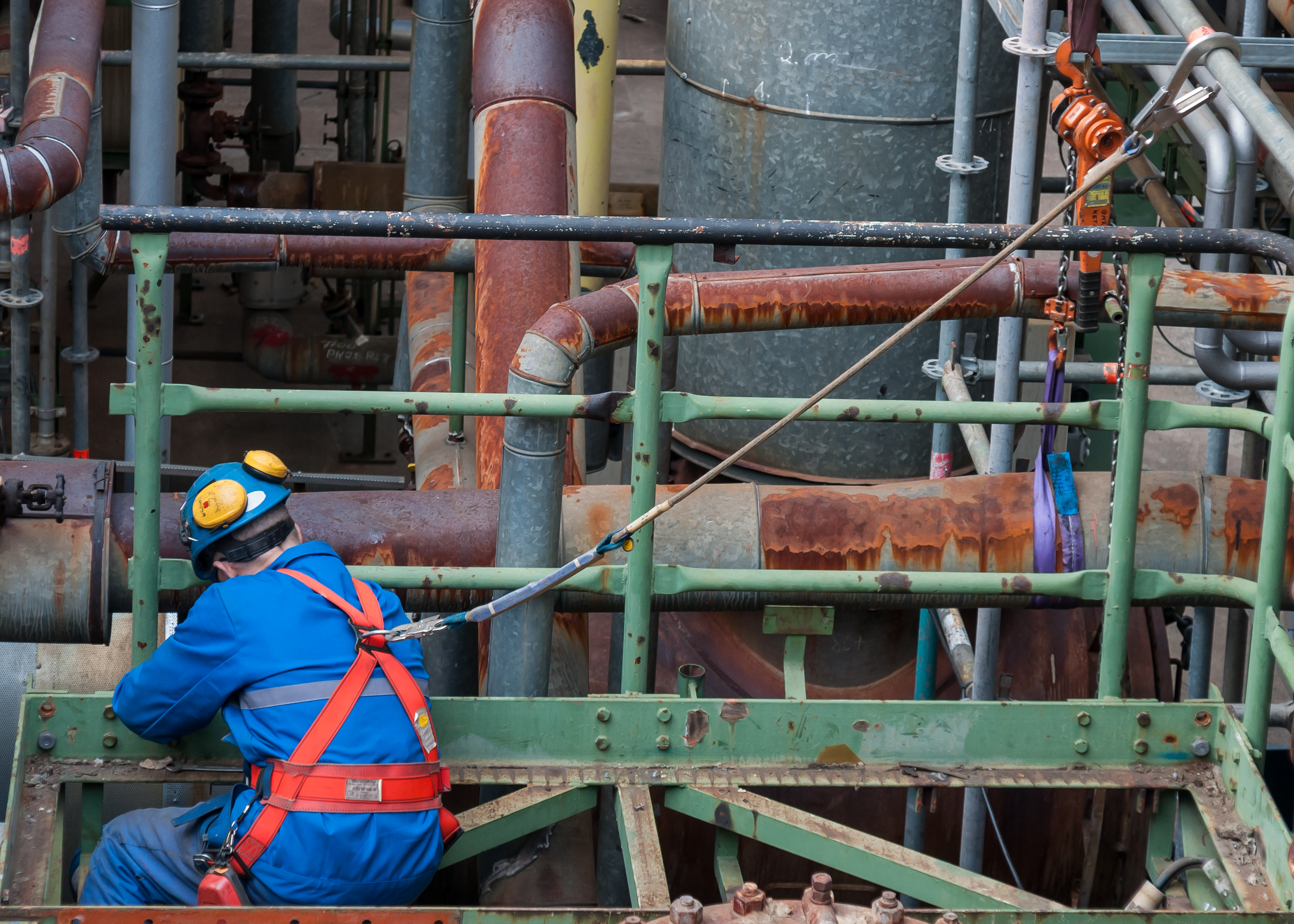 Cologne. Germany: Industrial worker with safety harness and fall arrestor